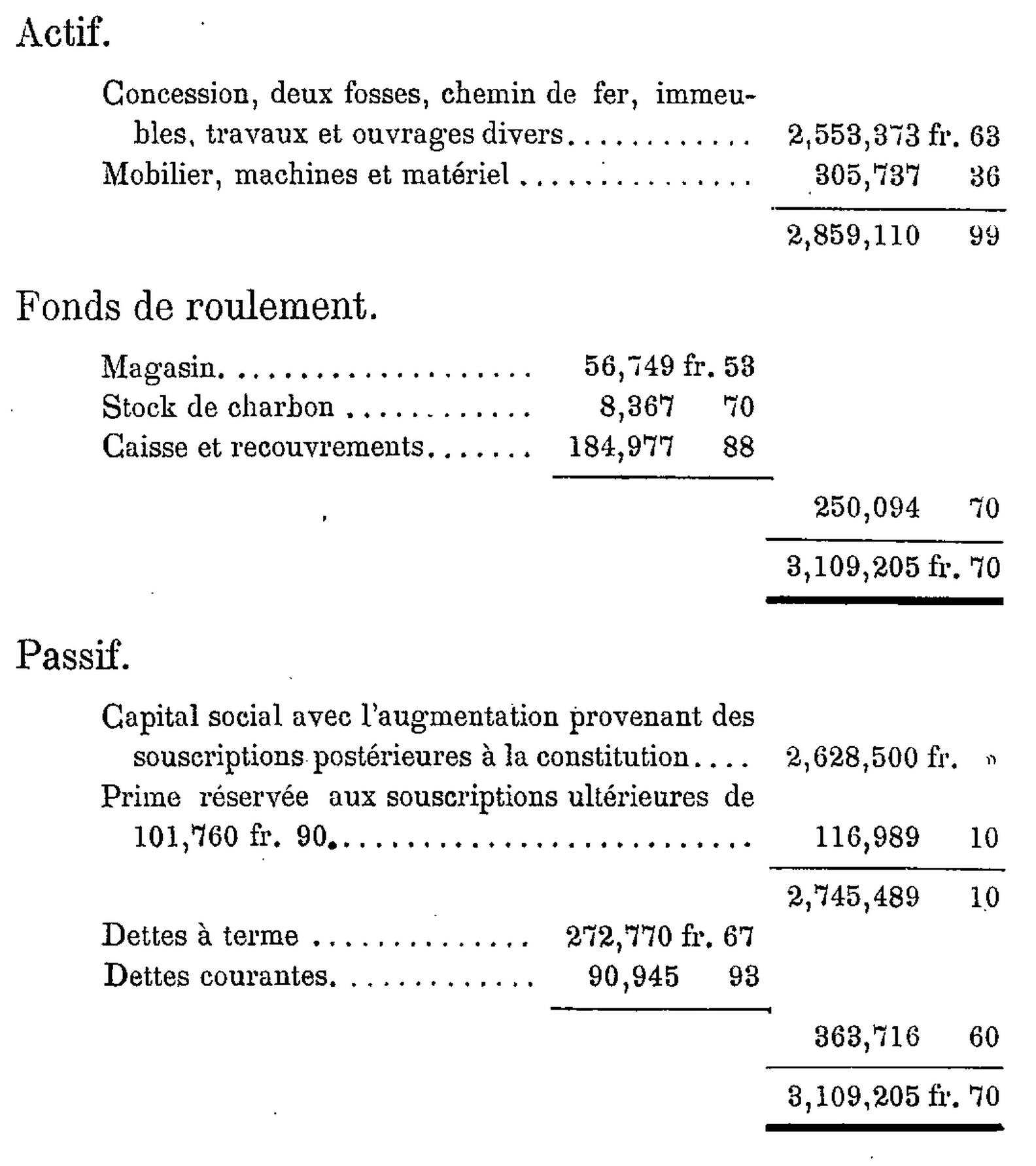 Bilan au 31 décembre 1868 de la Compagnie des mines d'Auchy-au-Bois.